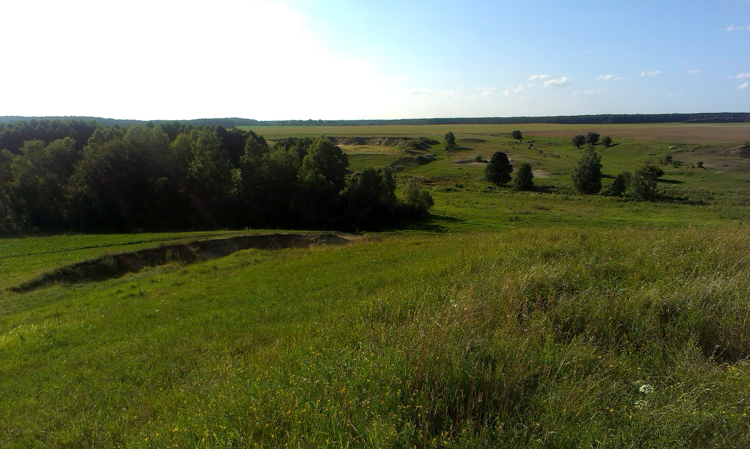 Від з Панскай горкі